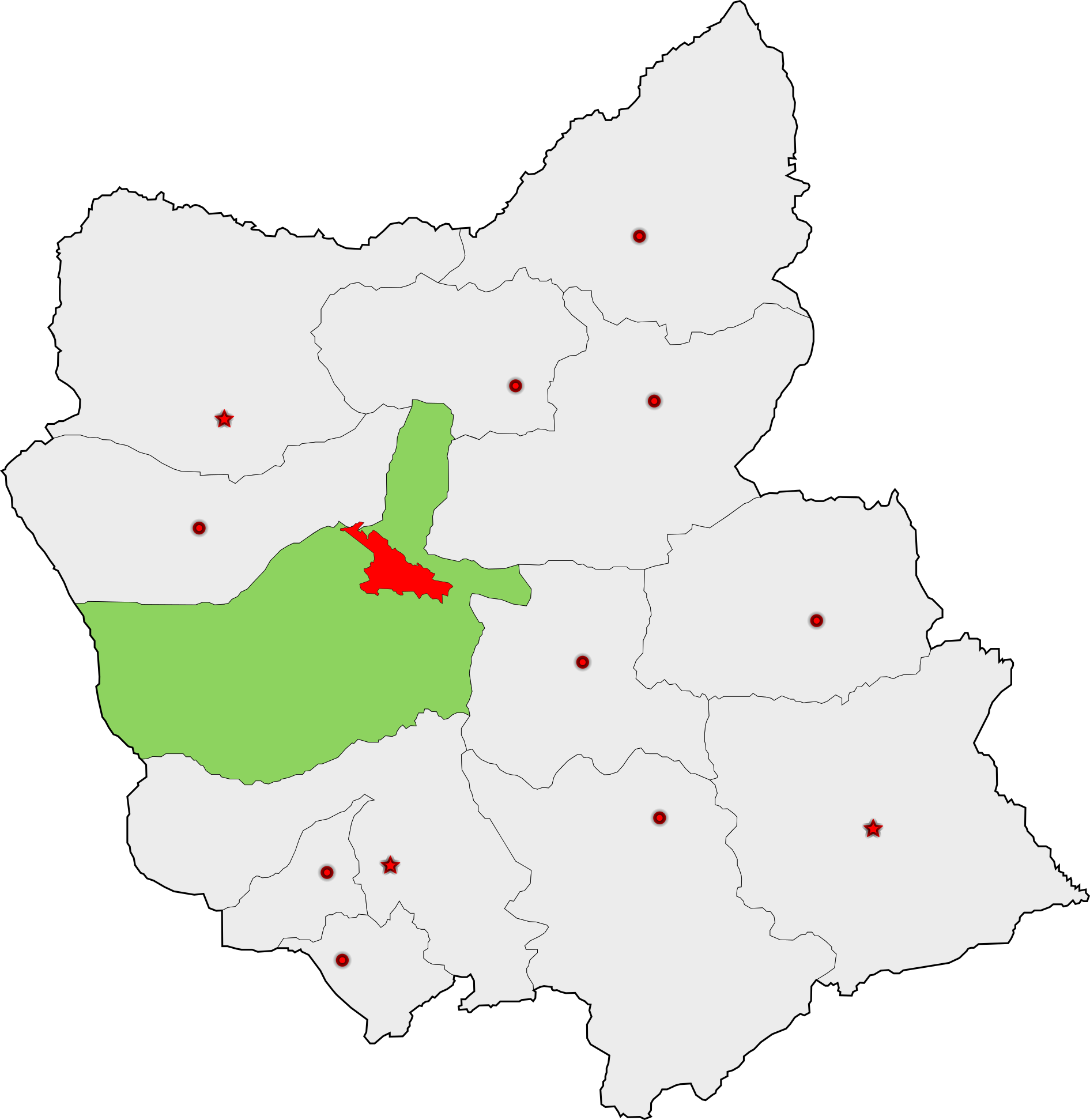 حوزهٔ انتخاباتی تبریز و آذرشهر و اسکو برای انتخابات مجلس شورای اسلامی